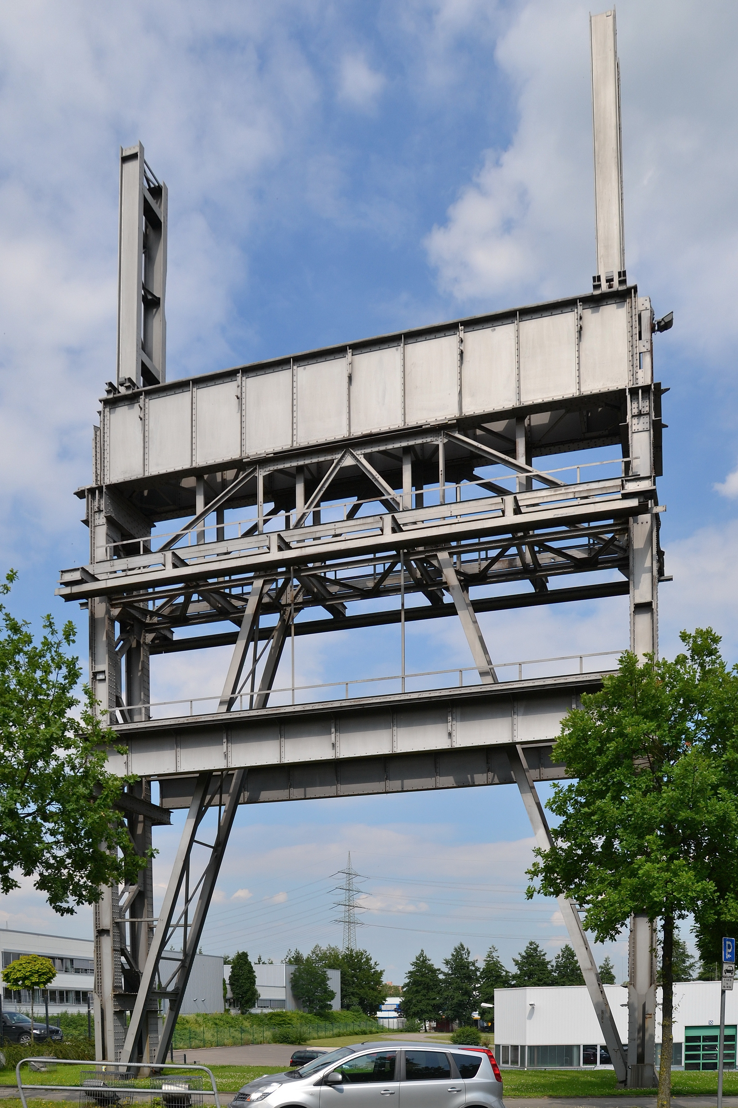 Stützträger der ehemaligen Krupp-Maschinenbauhalle M1 in Essen